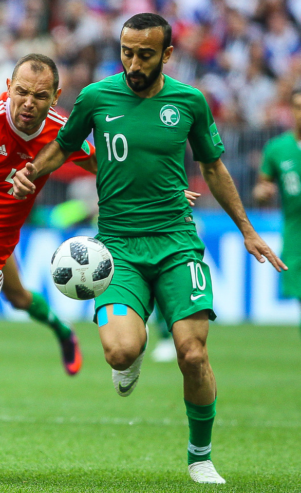 Сборная России бушует. Матч открытия удался на славу!